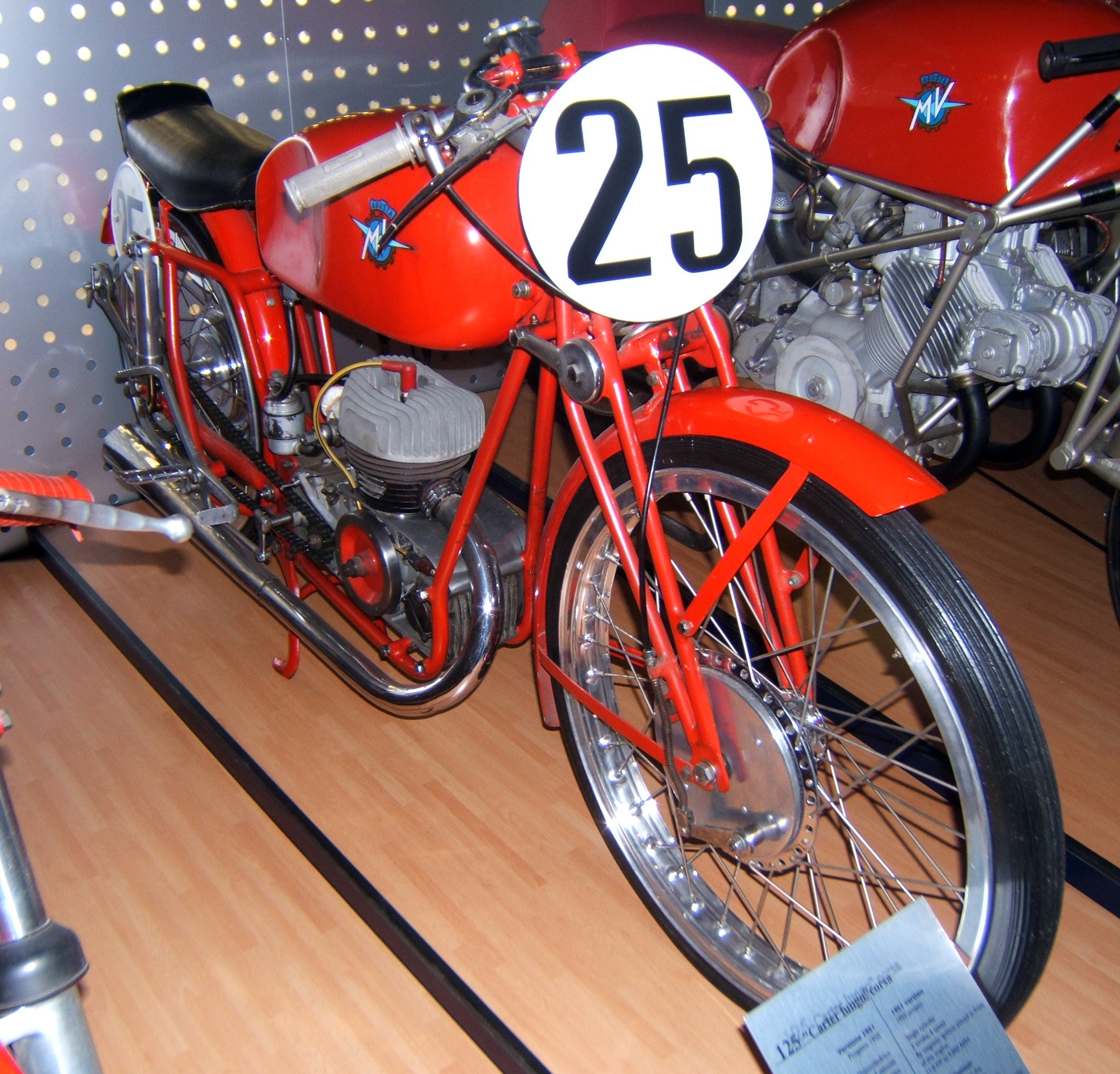 MV Agusta 125 Carter Lungo tipo "competizione", museo MV Agusta di Cascina Costa